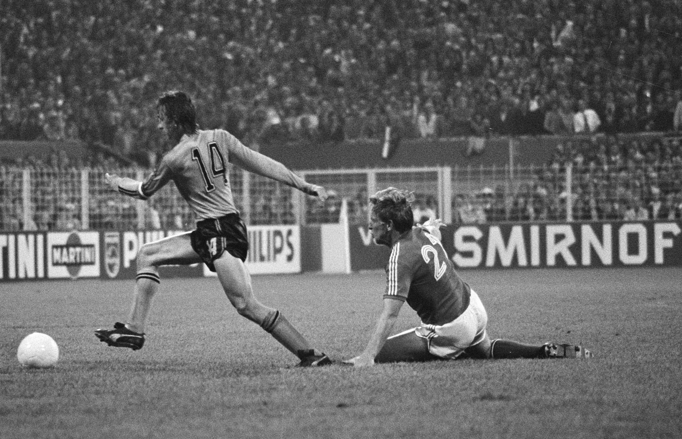 Collectie / Archief : Fotocollectie Anefo Reportage / Serie : [ onbekend ] Beschrijving : WK 74, Nederland tegen Zweden 0-0, Johan Cruijff passeert Persson (21) Datum : 19 juni 1974 Trefwoorden : sport, voetbal, wereldkampioenschappen Persoonsnaam : Cruijff, Johan Fotograaf : Mieremet, Rob / Anefo Auteursrechthebbende : Nationaal Archief Materiaalsoort : Negatief (zwart/wit) Nummer archiefinventaris : bekijk toegang 2.24.01.05 Bestanddeelnummer : 927-2678